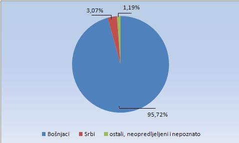 Graf nacionalnog sastava stanovništva u Lokvama 1991.